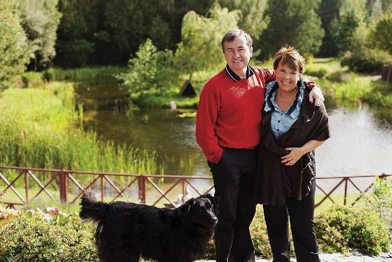 Małżeństwo Krzysztof i Solange Olszewscy.